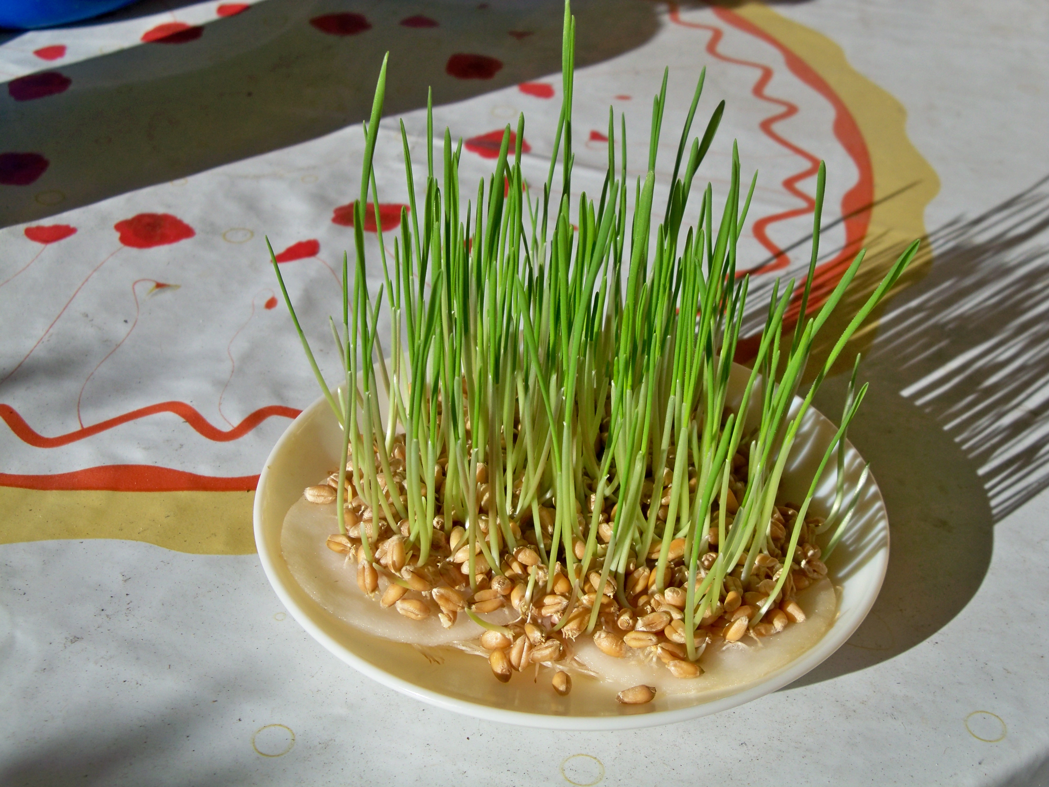 Blé de la Sainte Barbe en cours de pousse